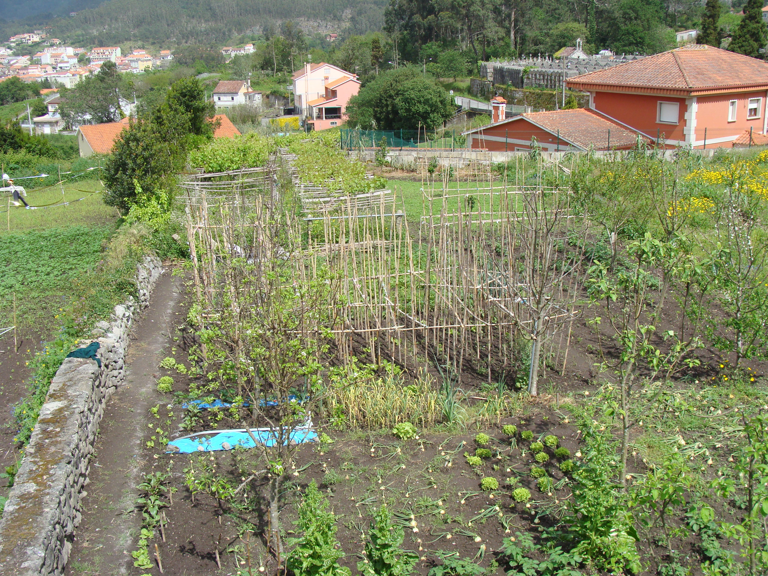 Miniparcelas (unos 100 m2, aproximadamente) junto a la población de Cangas, provincia de Pontevedra.